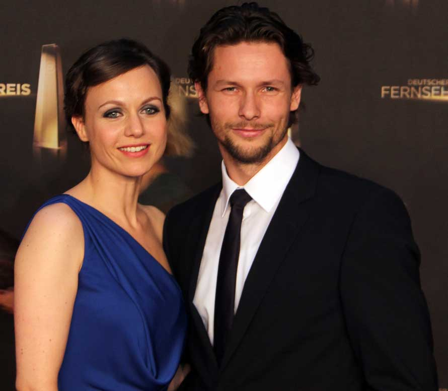 Nadja Becker mit Begleitung beim Deutschen Fernsehpreis 2012